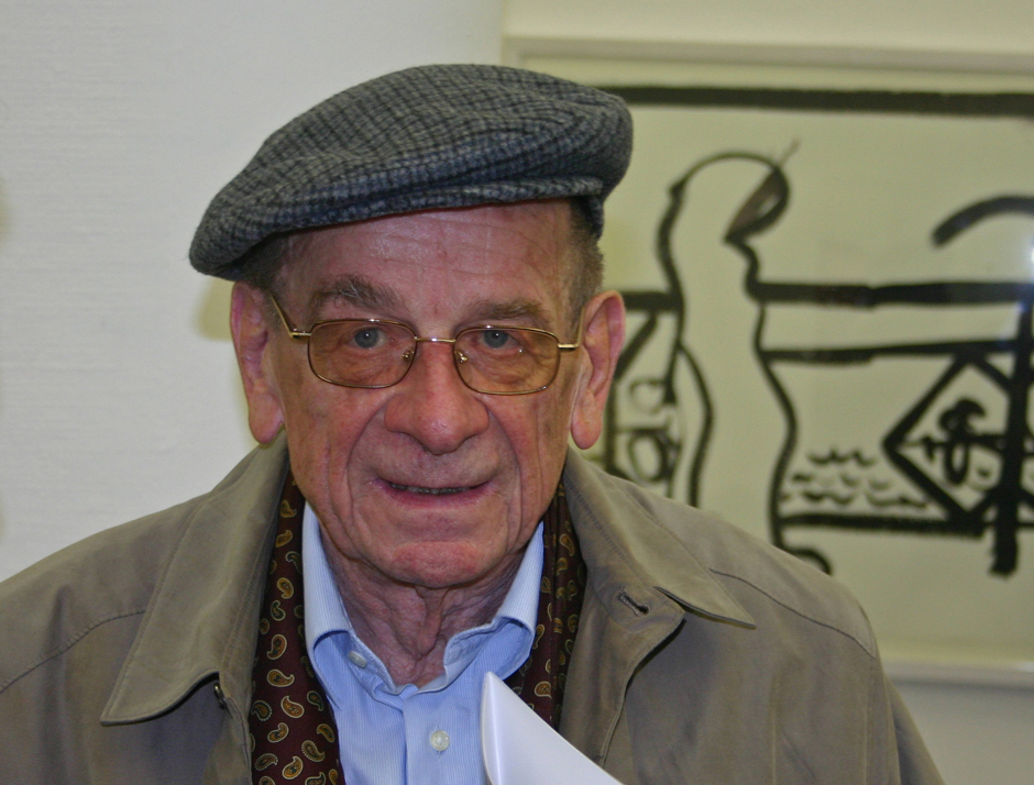 Der Maler Dieter Goltzssche während einer Ausstellungseröffnung anlässlich seines 80. Geburtstages.